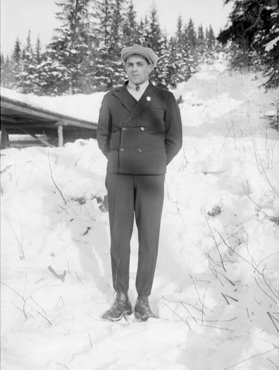 Norwegian skier Arne Rustadstuen in Lillehammer